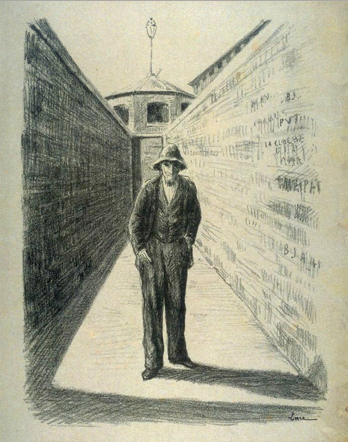 Lithographie de Maximilien Luce extraite du livre Mazas de Jules Vallès